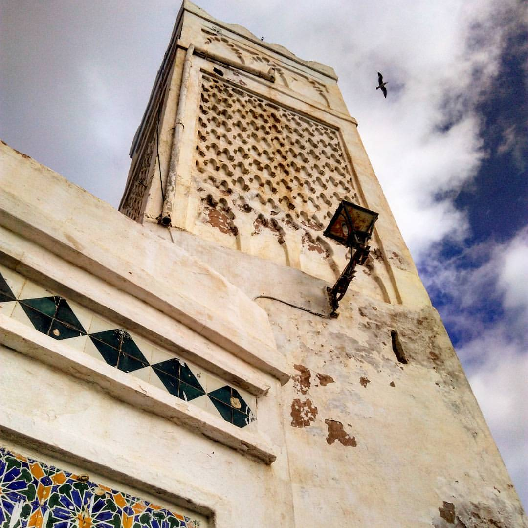 Minaret de la mosquée Sidi Ramdane (Alger)